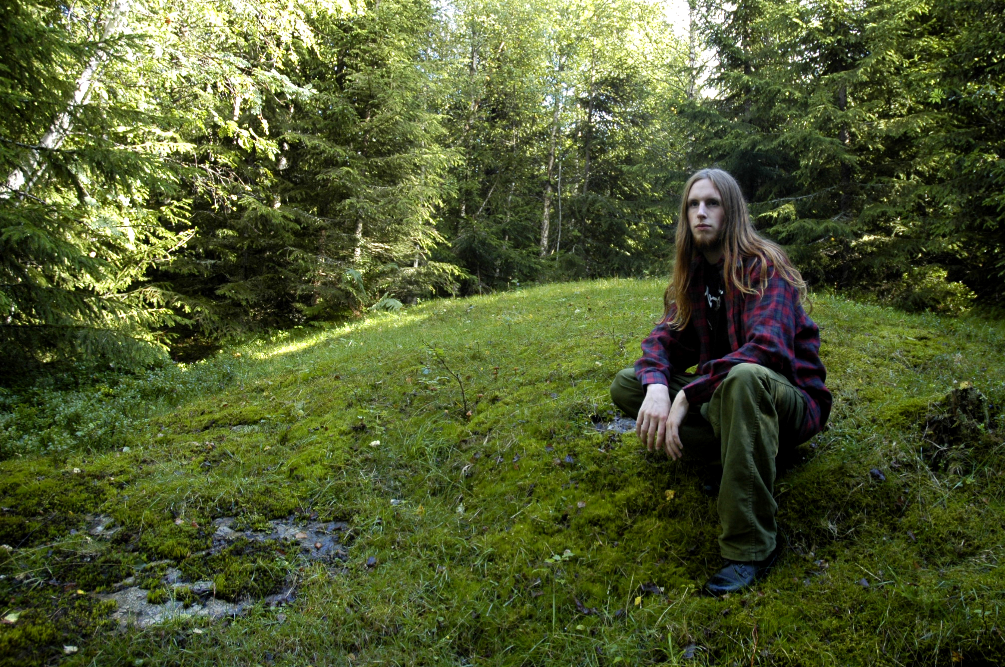 Lars Jensen from the folk metal-band Myrkgrav